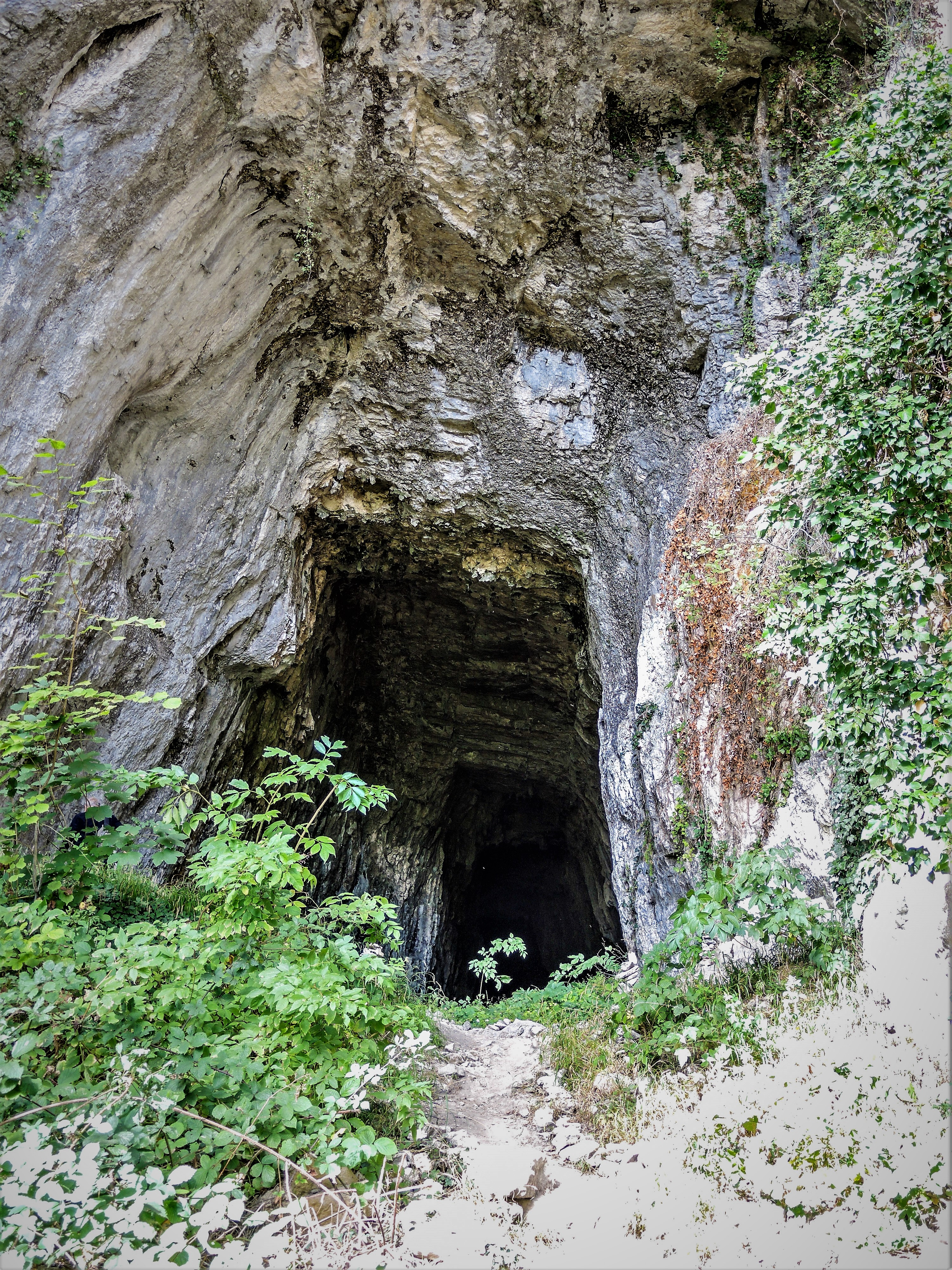 Vue extérieure du porche de la grotte du château de la roche. Soulce-Cernay. Doubs